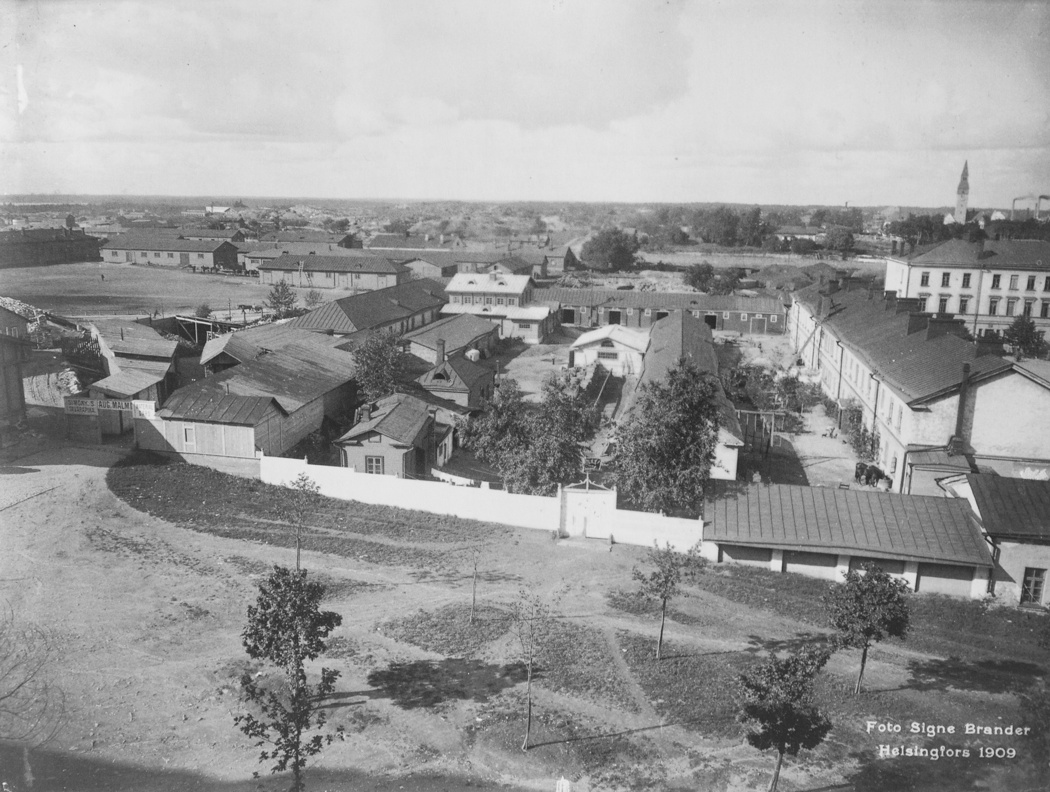 Näkymä Turun kasarmille Simonkadulta vuonna 1909. Oikeassa reunassa pitkittäin linja-autoasema.